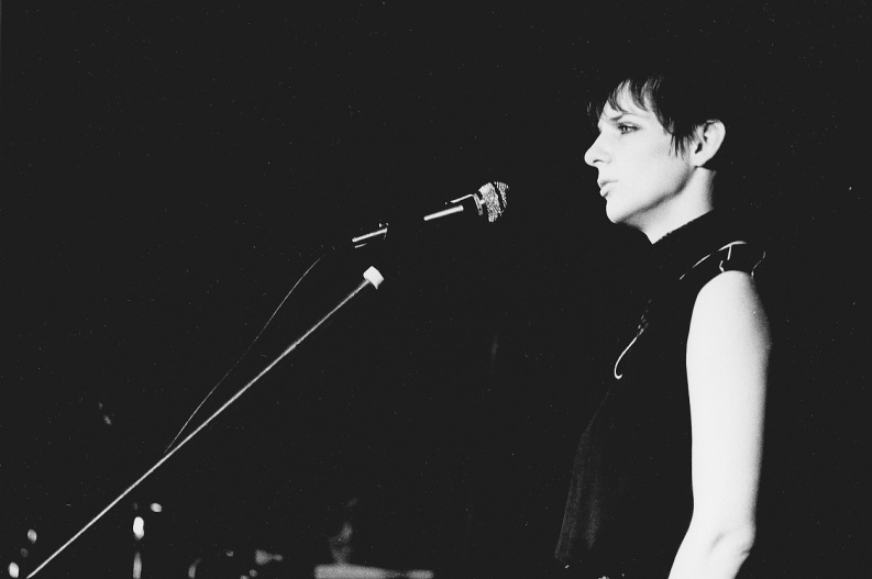 Leipziger Liederszene: Ines Krautwurst; Foto: Szenefotograf Jochen Janus